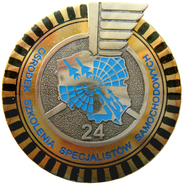 Odznaka 24. Ośrodka Szkolenia Specjalistów Samochodowych w Mrzeżynie